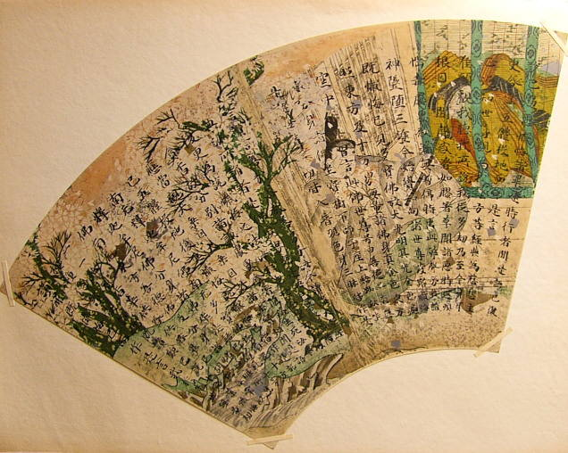 扇面法華経、四天王寺所蔵。日本平安時代後期12世紀の作品。